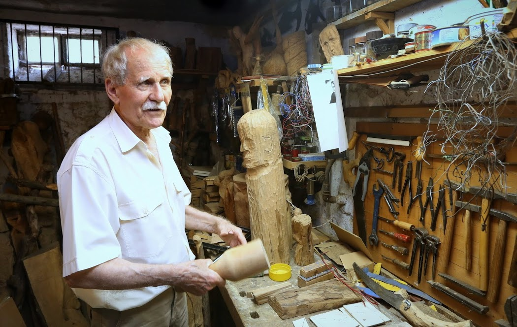 Somlai Lajos, festőművész